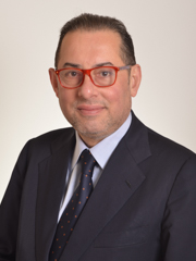 Ritratto Gianni Pittella